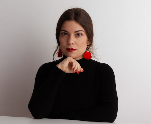 Laura Gomara en 2019